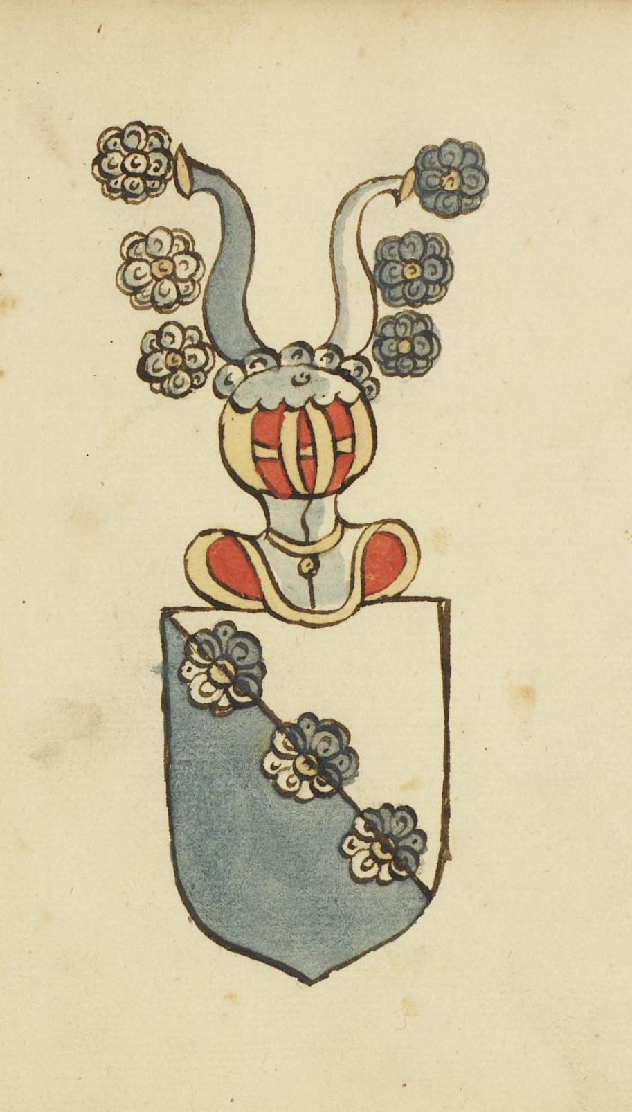 Illustrasjon hentet fra et privatarkiv i Nasjonalbiblioteket med tittelen "Insignia quædam virorum illustrium in Norvegia quodam habitantium" av Iver Nielssøn Hirtzholm.